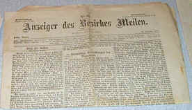 Titelseite des Anzeiger des Bezirks Meilen, Vorgängerzeitung der Zürichsee-Zeitung. Erschienen wöchentlich 1 Mal in Stäfa, 1868-1874.